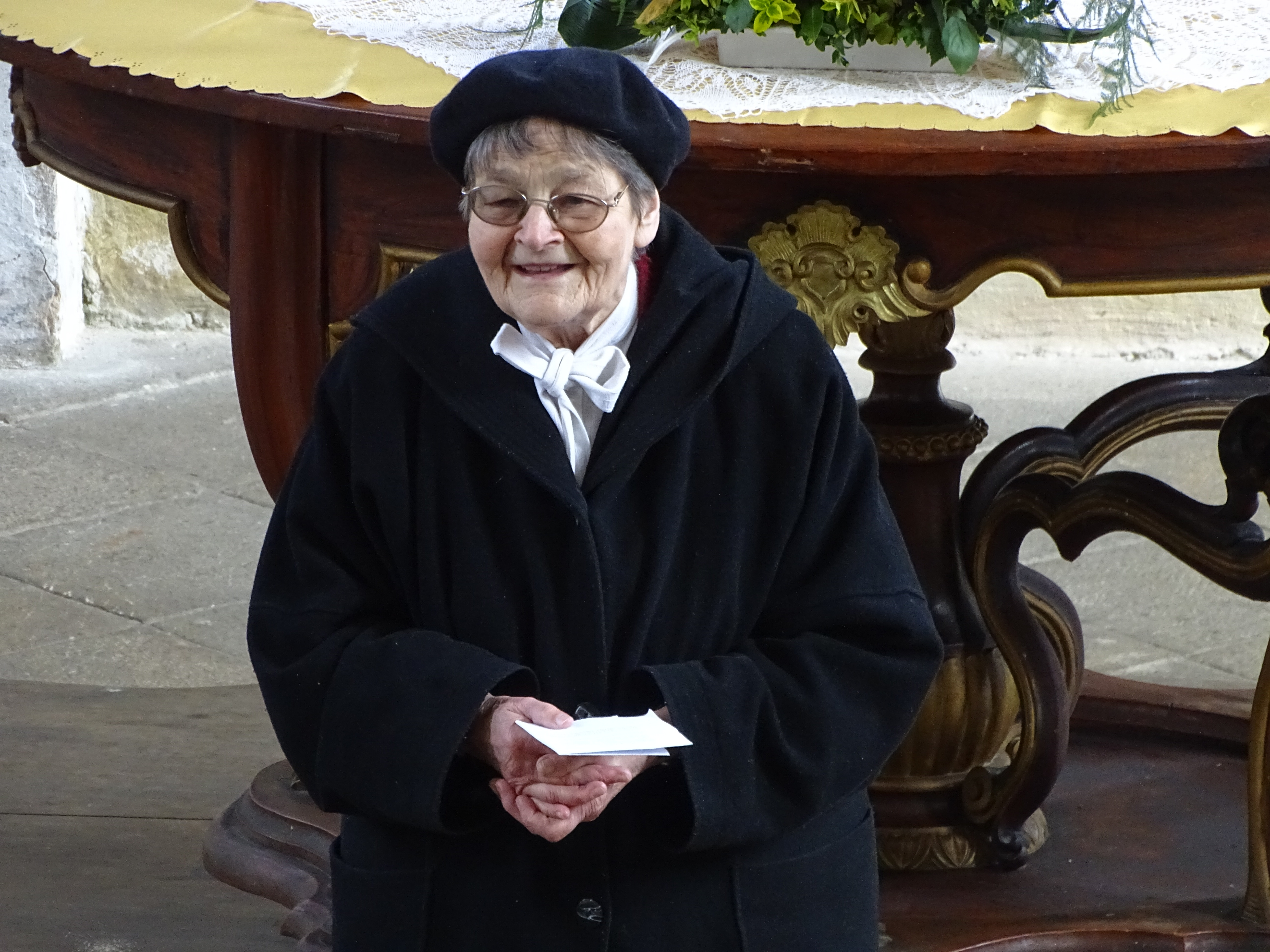 Eva Melmuková v horním kostele Evangelického tolerančního areálu ve Velké Lhotě u Dačic, 24.4.2016